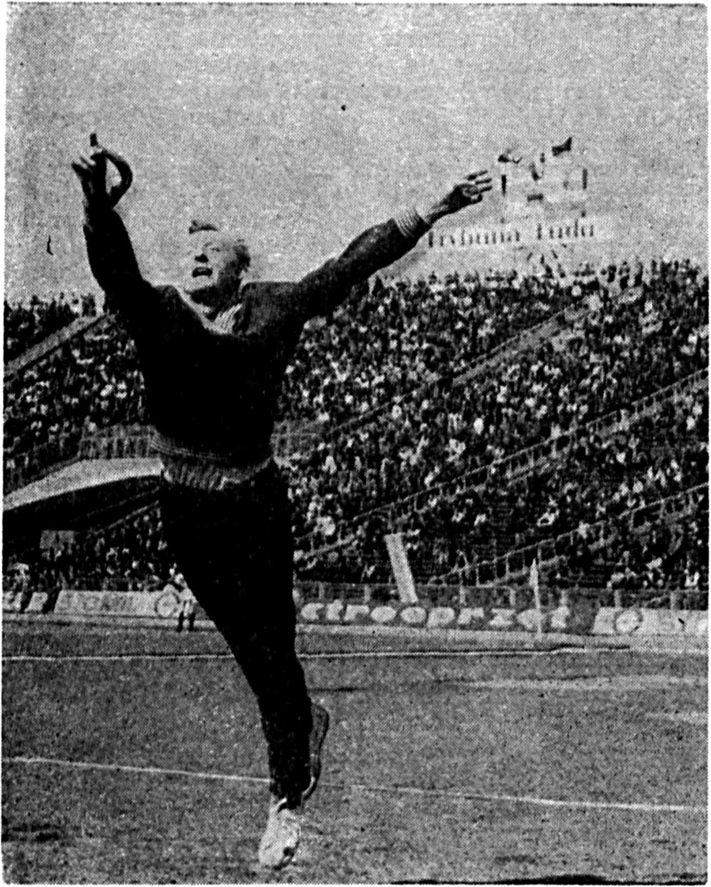 La krelnto de „Rlngo”, mag. Wlodzlmlerz Strzyiewski, dum la ludo.